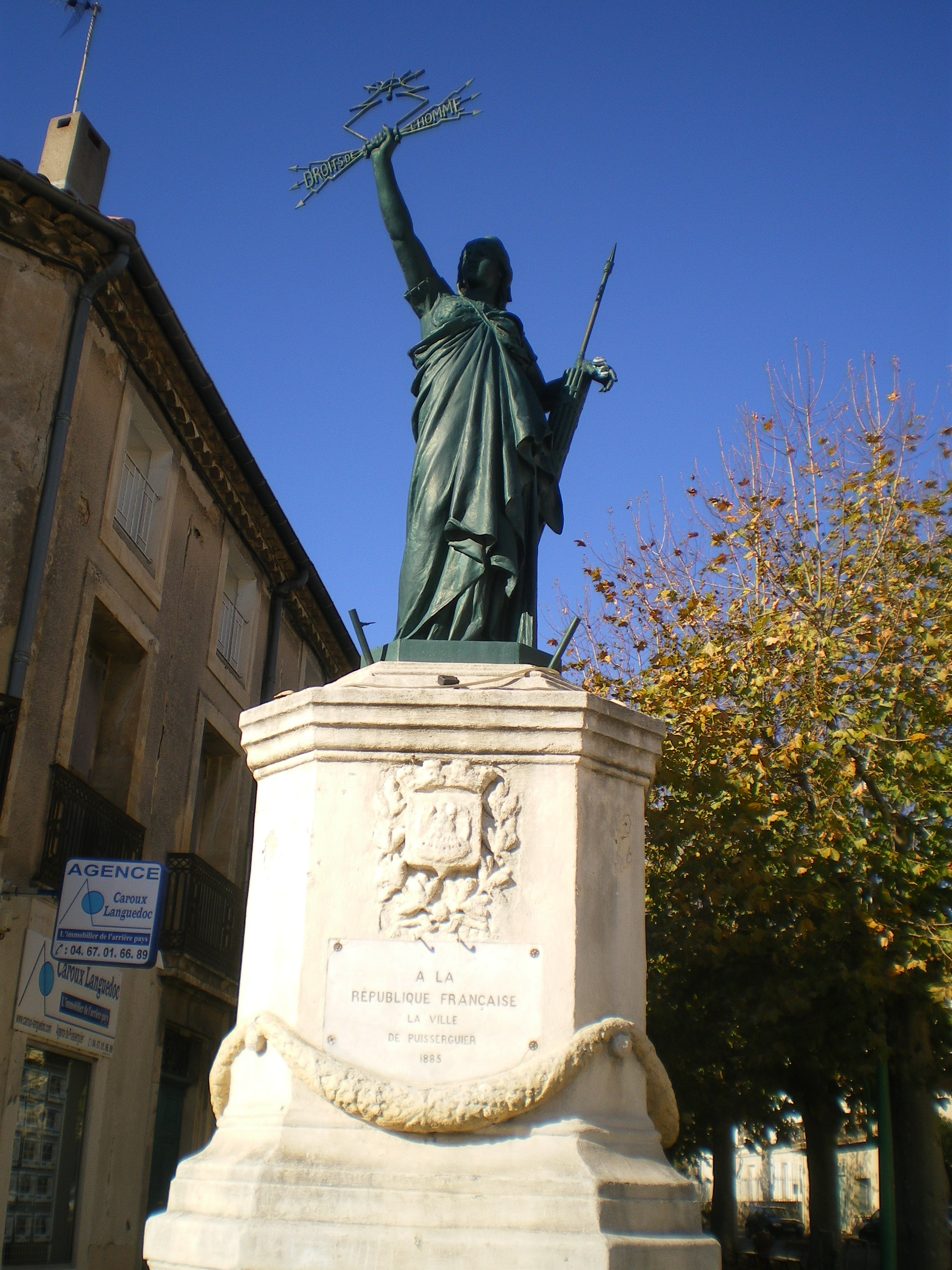 Marianne de Puisserguier, (Hérault) France, 2008